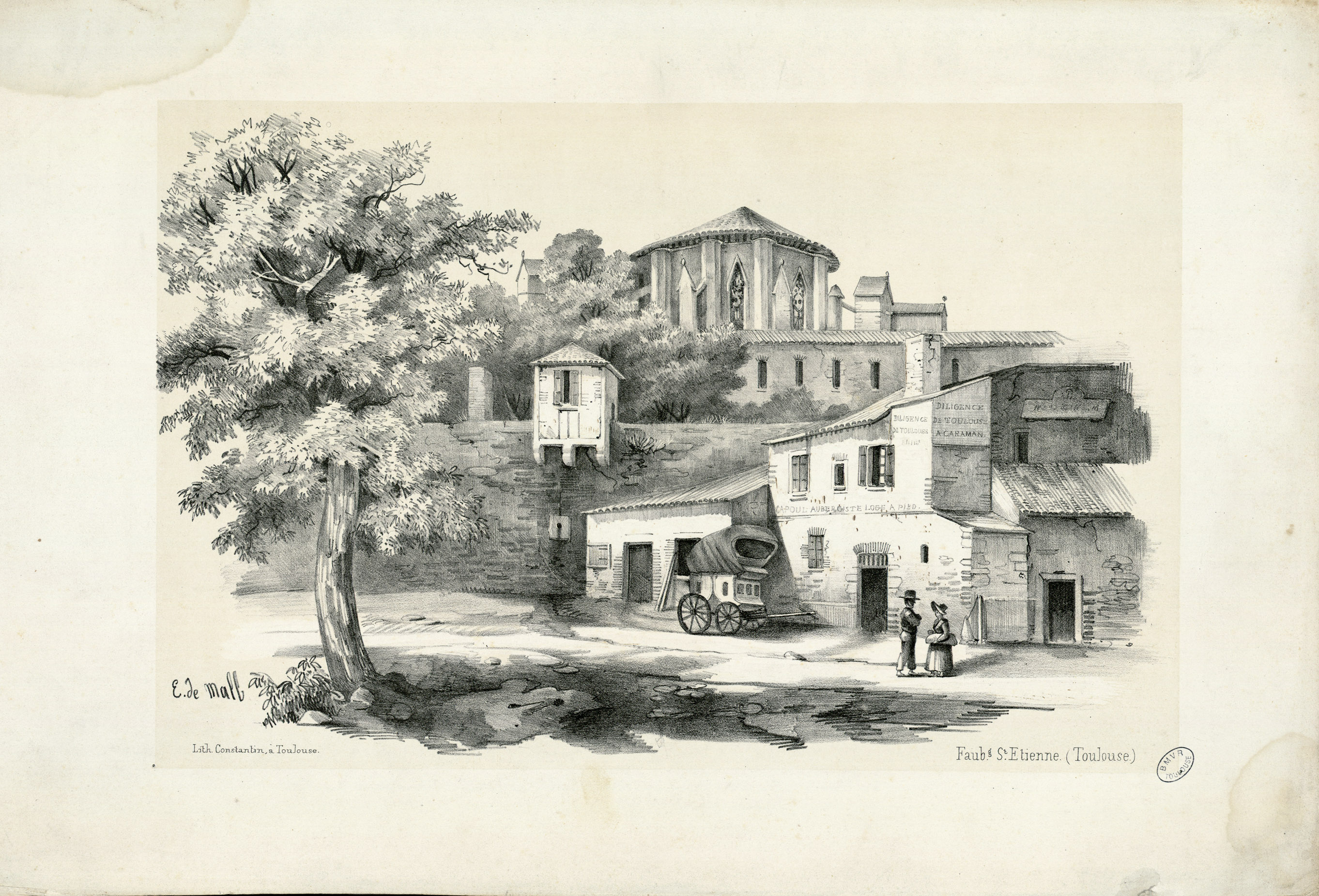 Le faubourg Saint-Étienne à Toulouse. Sur le relais de poste on peut lire CAPOUL AUBERGISTE LOGE A PIED. et DILIGENCE DE TOULOUSE A CARAMAN.